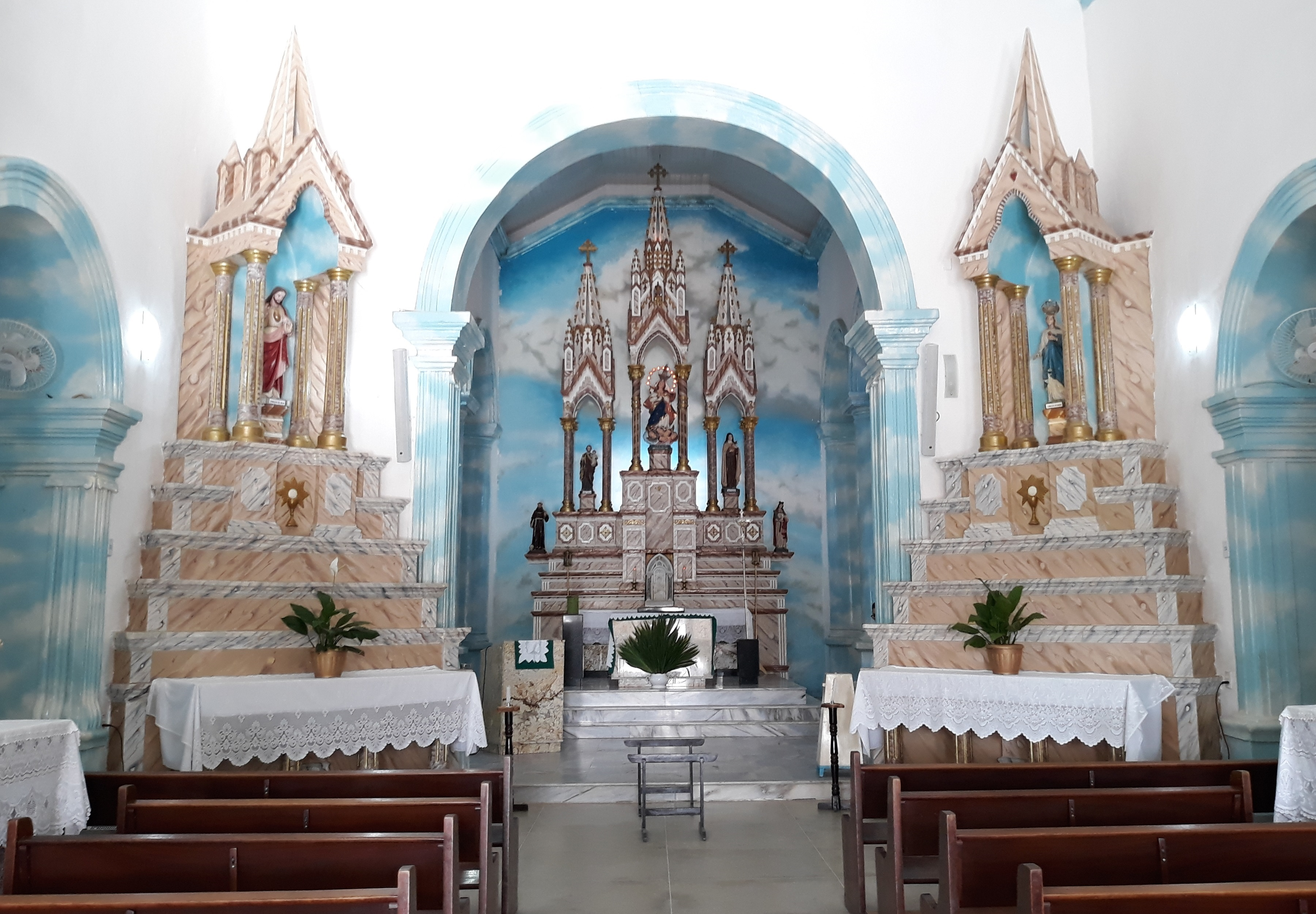 Português do Brasil: Vista interna da Igreja Matriz de Nossa Senhora da Conceição de Martins, Rio Grande do Norte (Brasil)